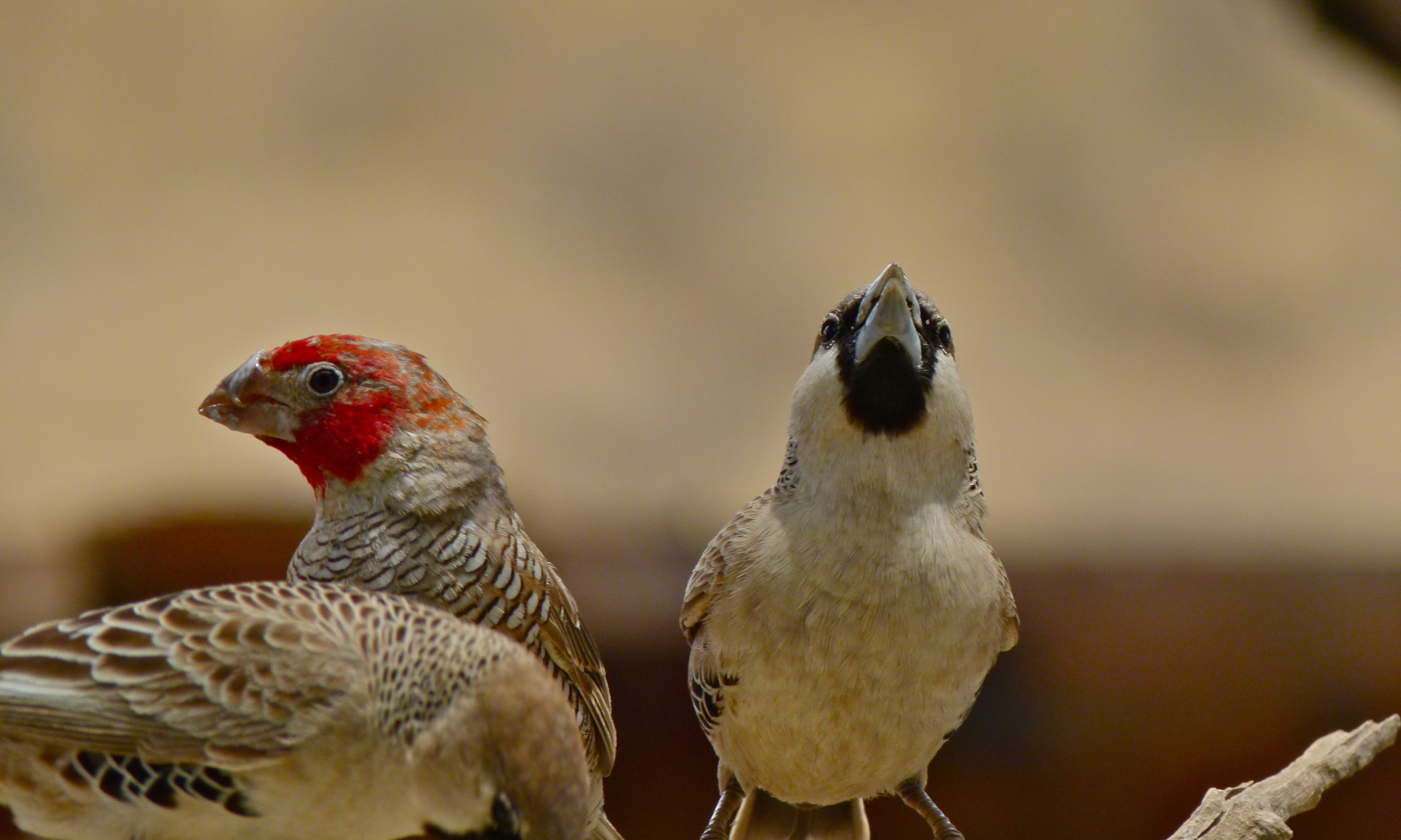 Grootkolk Camp, Kgalagadi Transfrontier Park, SOUTH AFRICA